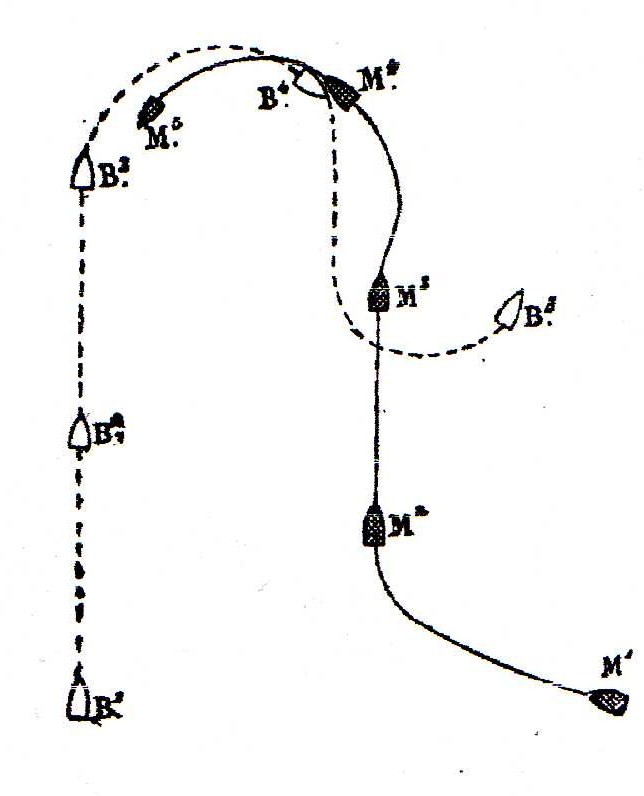 Plan du combat du Bouvet et du Meteor